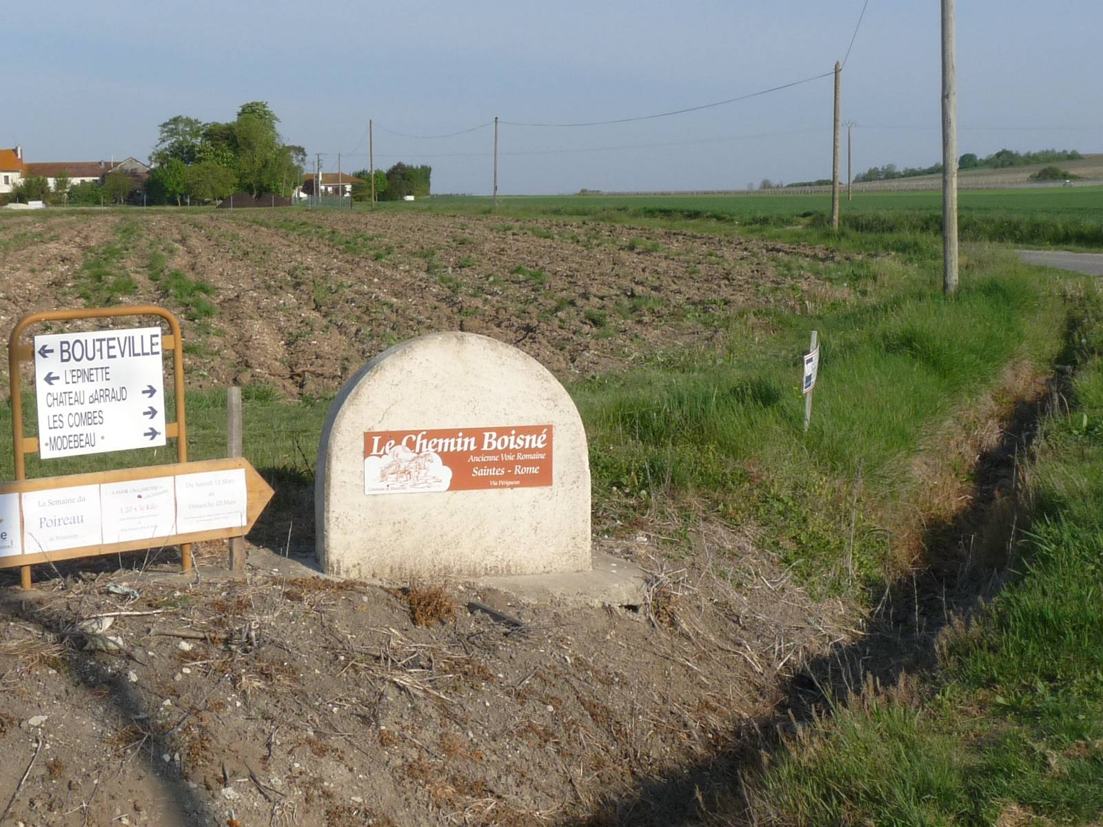 Chemin Boisné à Douvesse, Bouteville, Charente, France